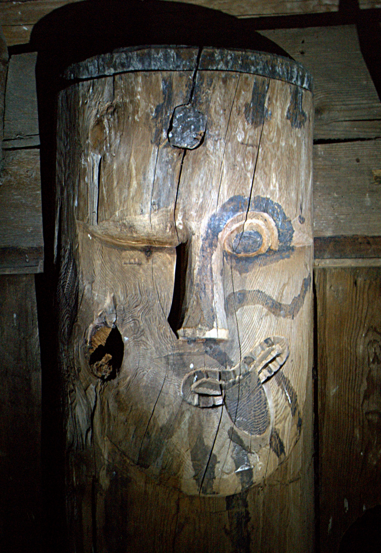 mask on top of a stave at Hegge stavkirke